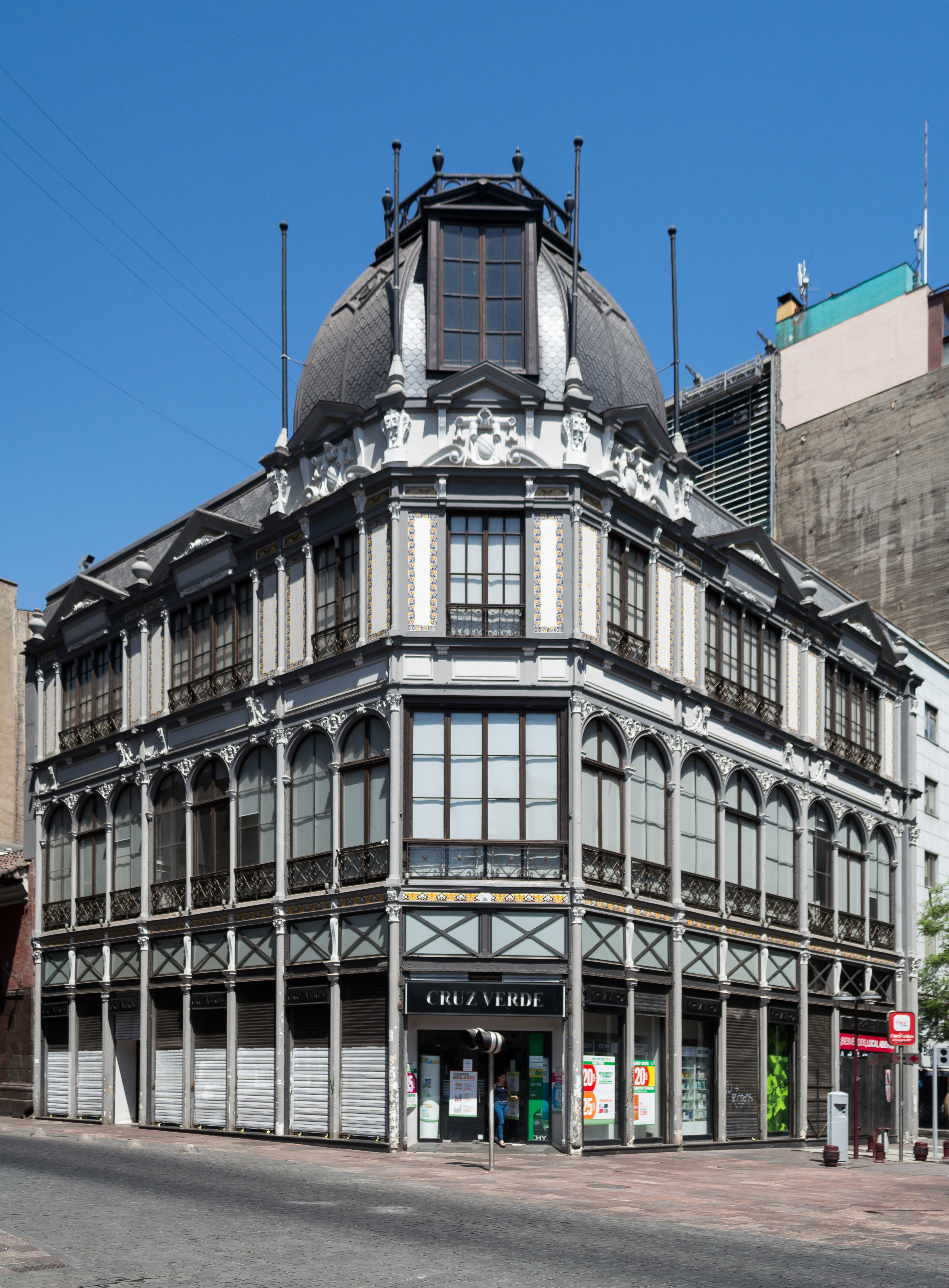 Edificio Comercial Edwards, Santiago, Región Metropolitana, Chile